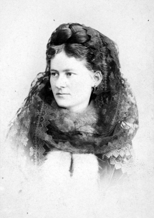 Photo portrait.